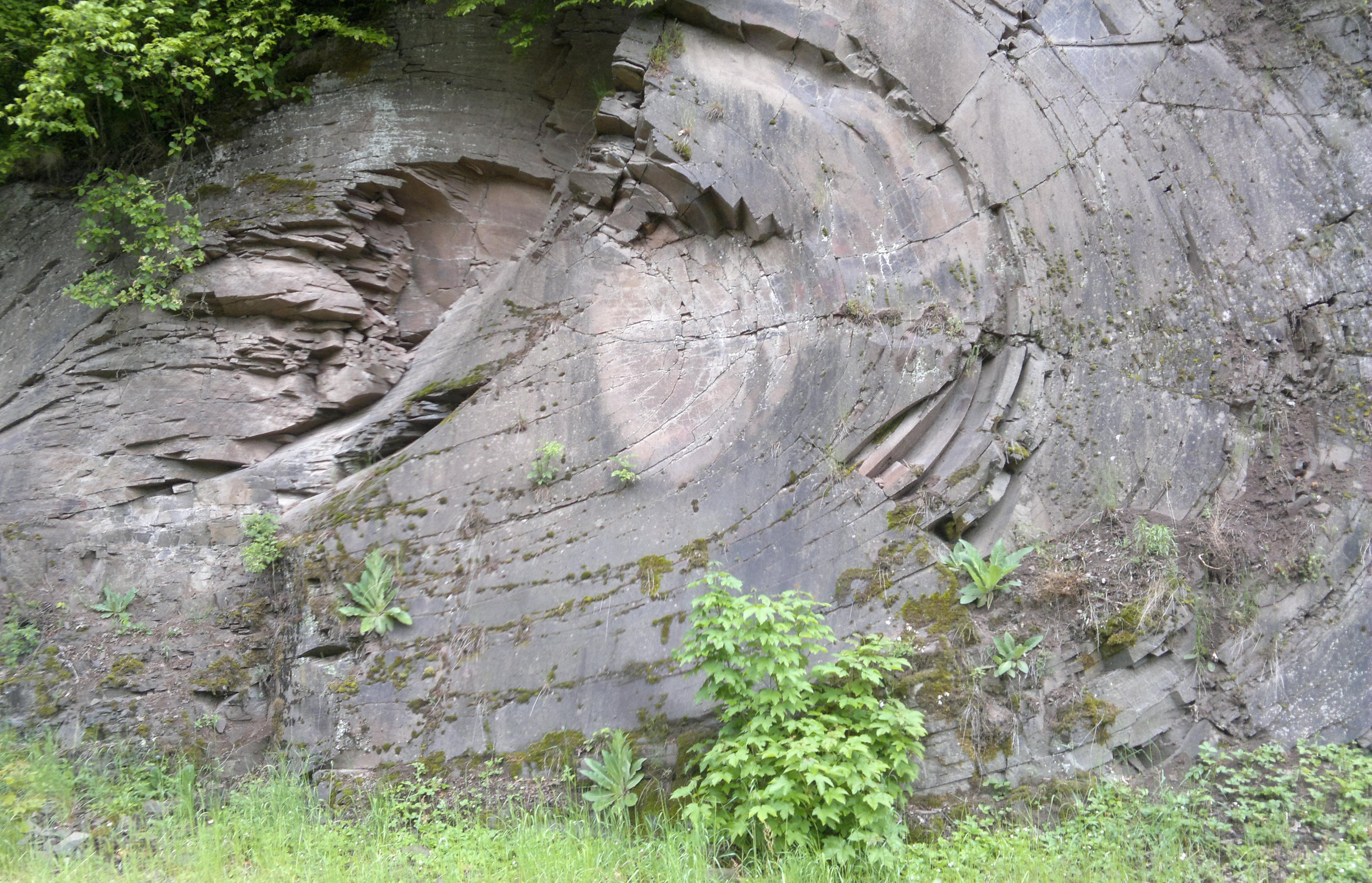 Erkalteter Lavastrom; wurde bei Sprengungen im ehem. Steinbruch entdeckt und unter Schutz gestellt; befindet sich wenige hundert Meter innerhalb des Truppenübungsplatzes Baumholder von der L 169 kommend